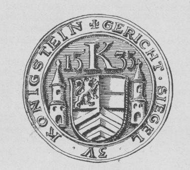 Gerichtssiegel des Stadtgerichtes Königstein von 1835